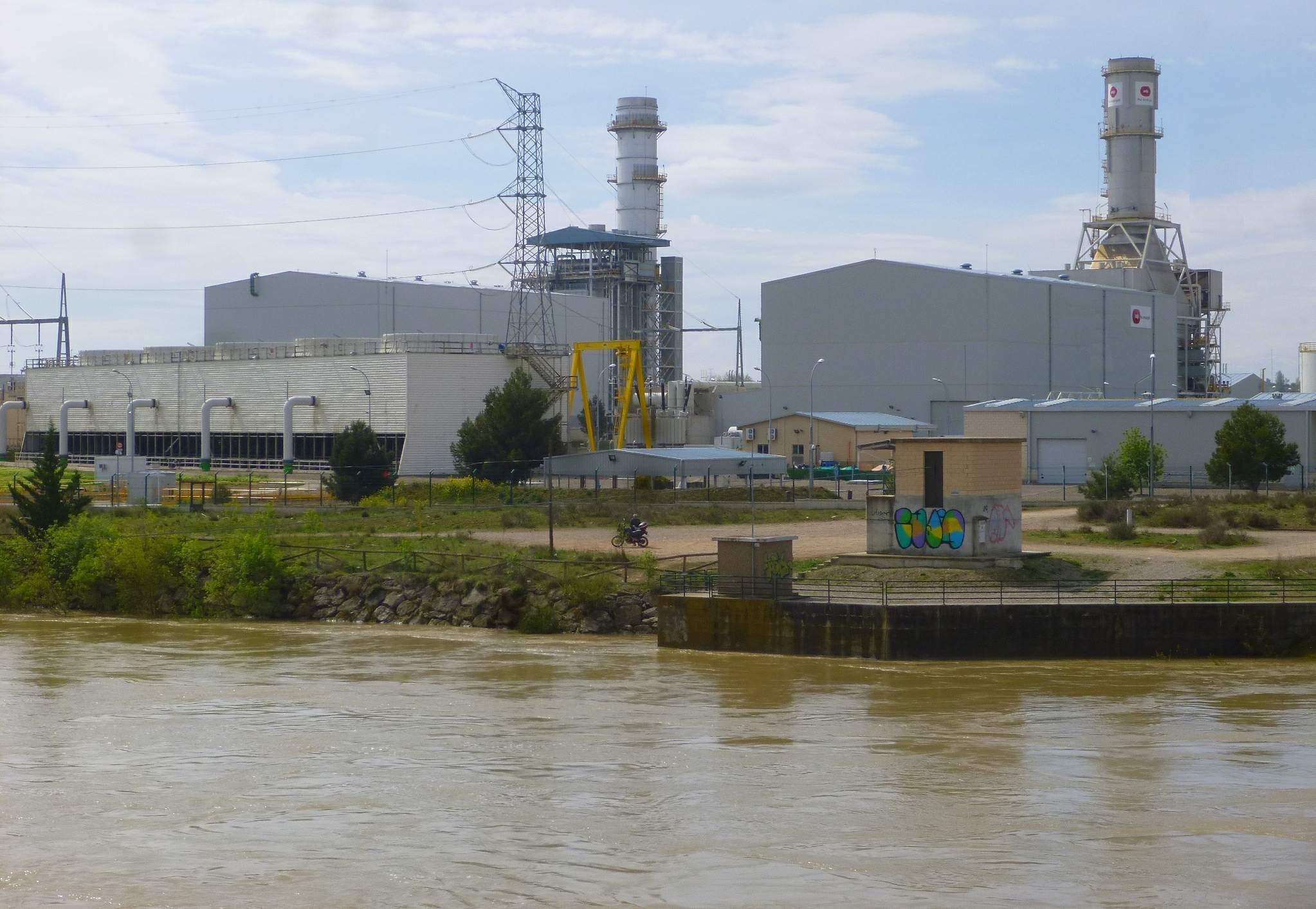 Castejón (Navarra) - Central térmica de ciclo combinado Elerebro (EDP HC Energía), Grupos I (Castejón 1) y II (Castejón 3)